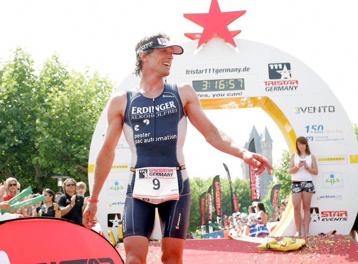 Christian Brader beim "Tristar 111 Germany" in Worms (06.06.2010)